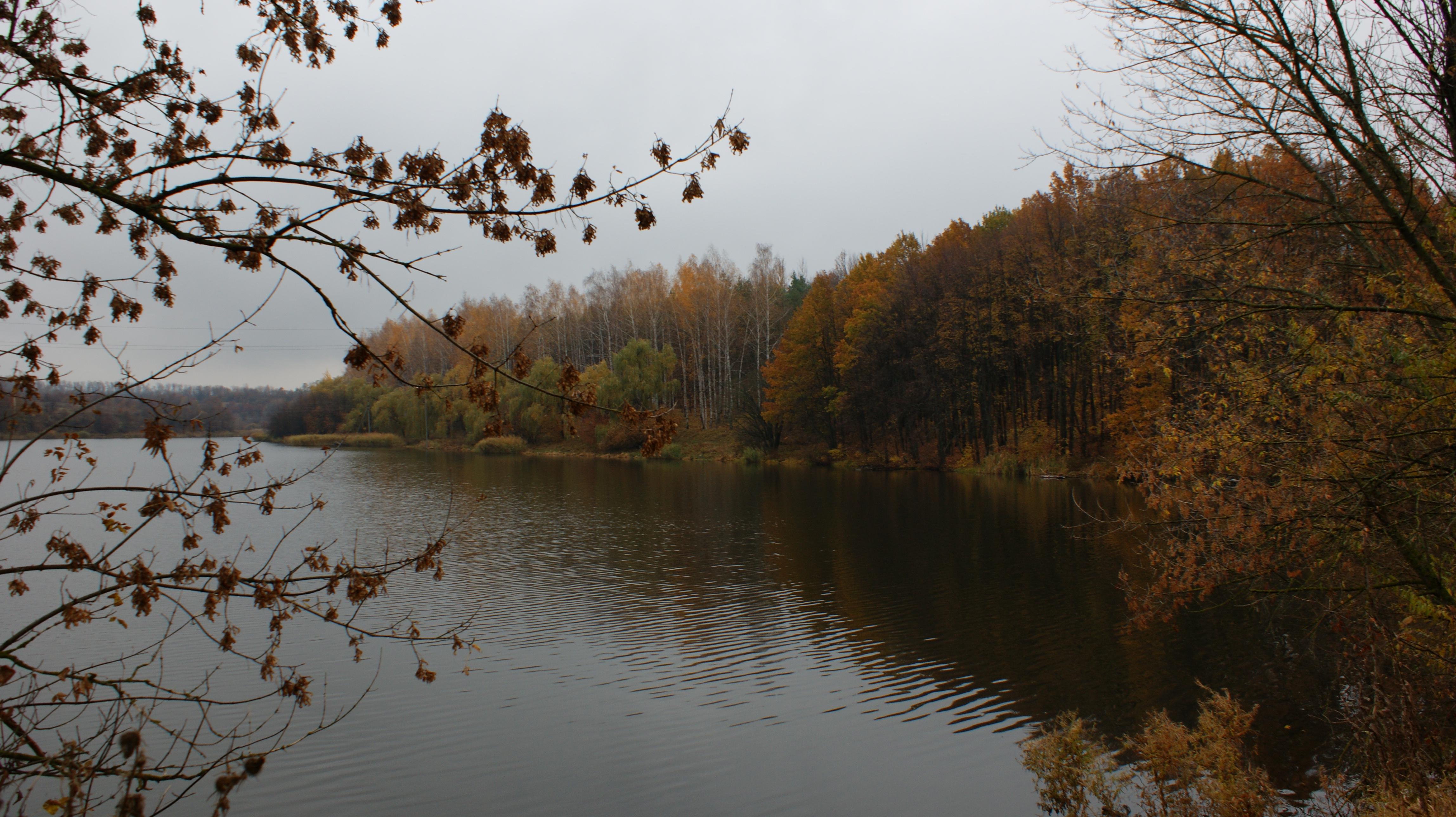 Парк с прудом (Белгородская область, Грайворон, р. п. ракитное)